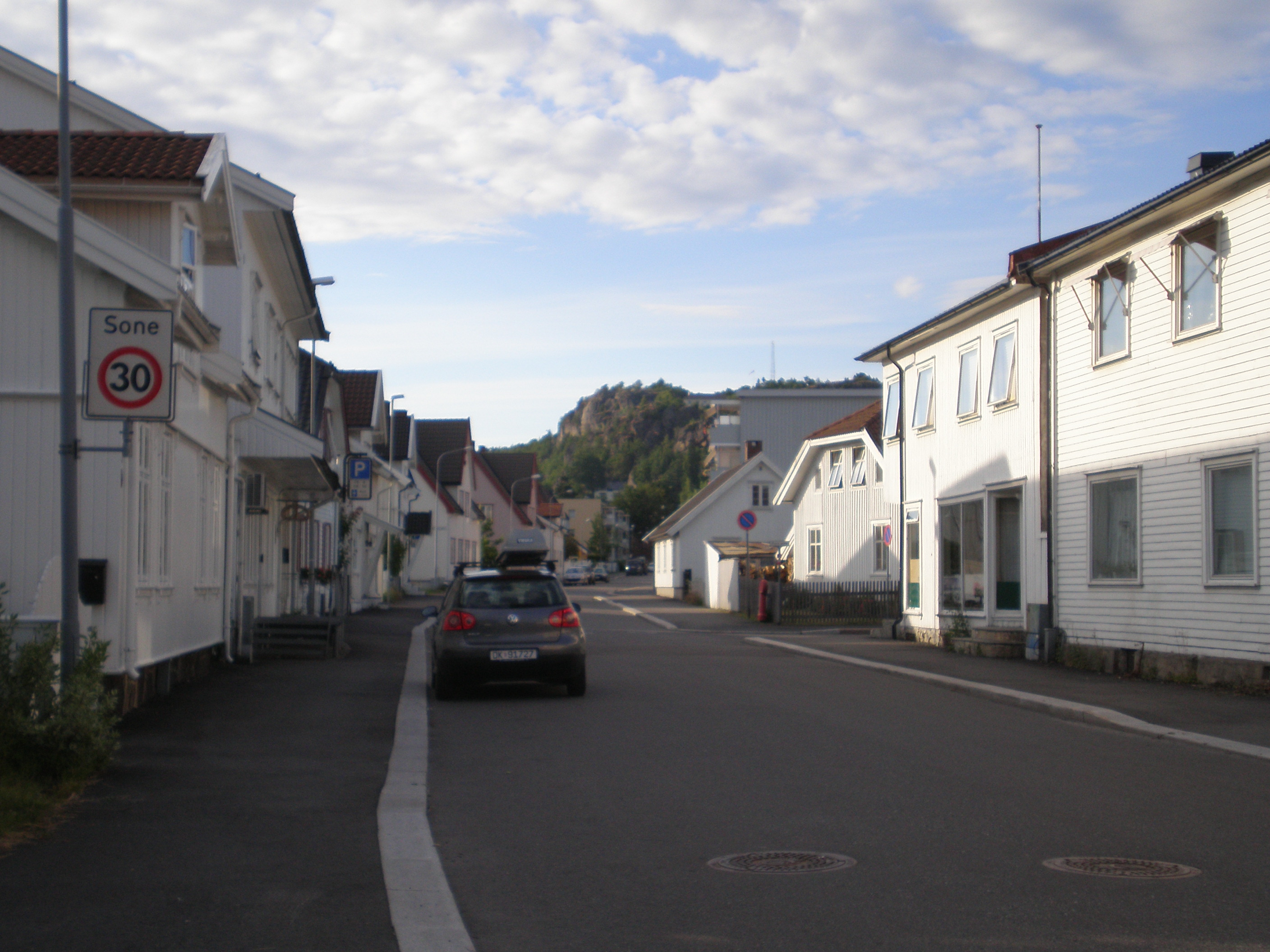 Sandefjord, Norwegia